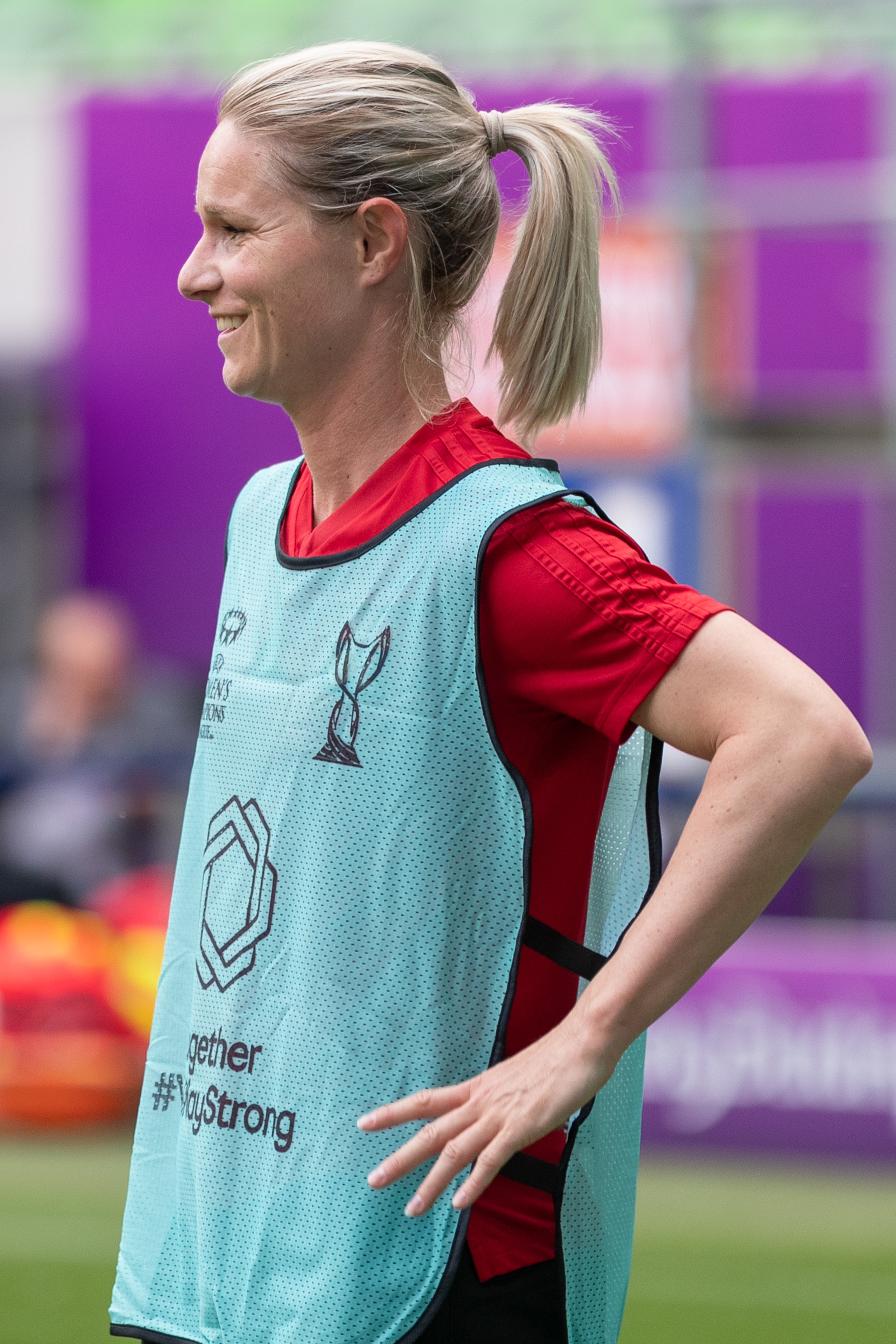 Fußball, Frauen, UEFA Women's Champions League, Olympique Lyonnais - FC Barcelona; Amandine Henry (Olympique Lyon, 6); beim Abschlusstraining